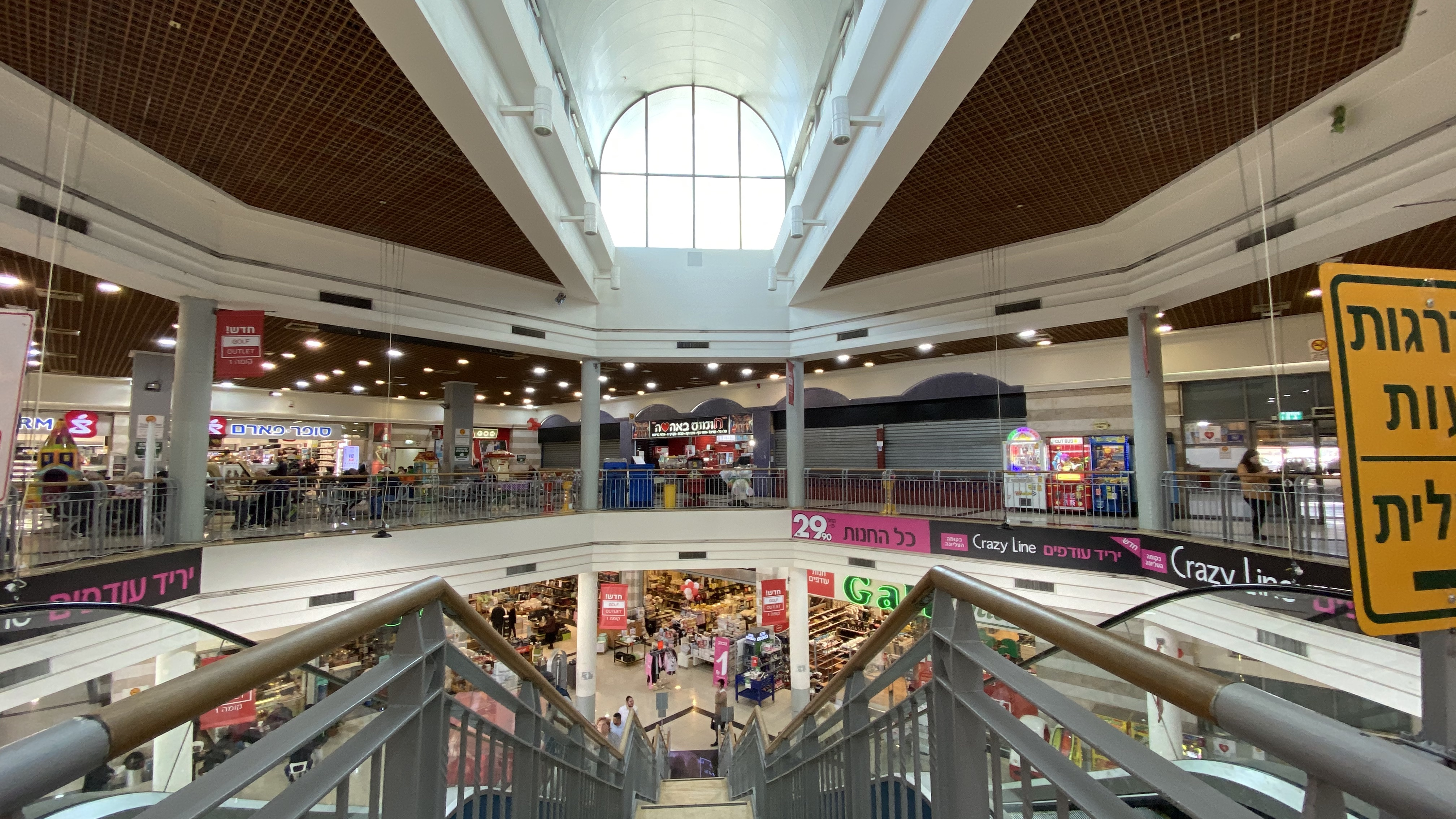 מבט פנים מהמפלס העליון בתחנה המרכזית ברמלה